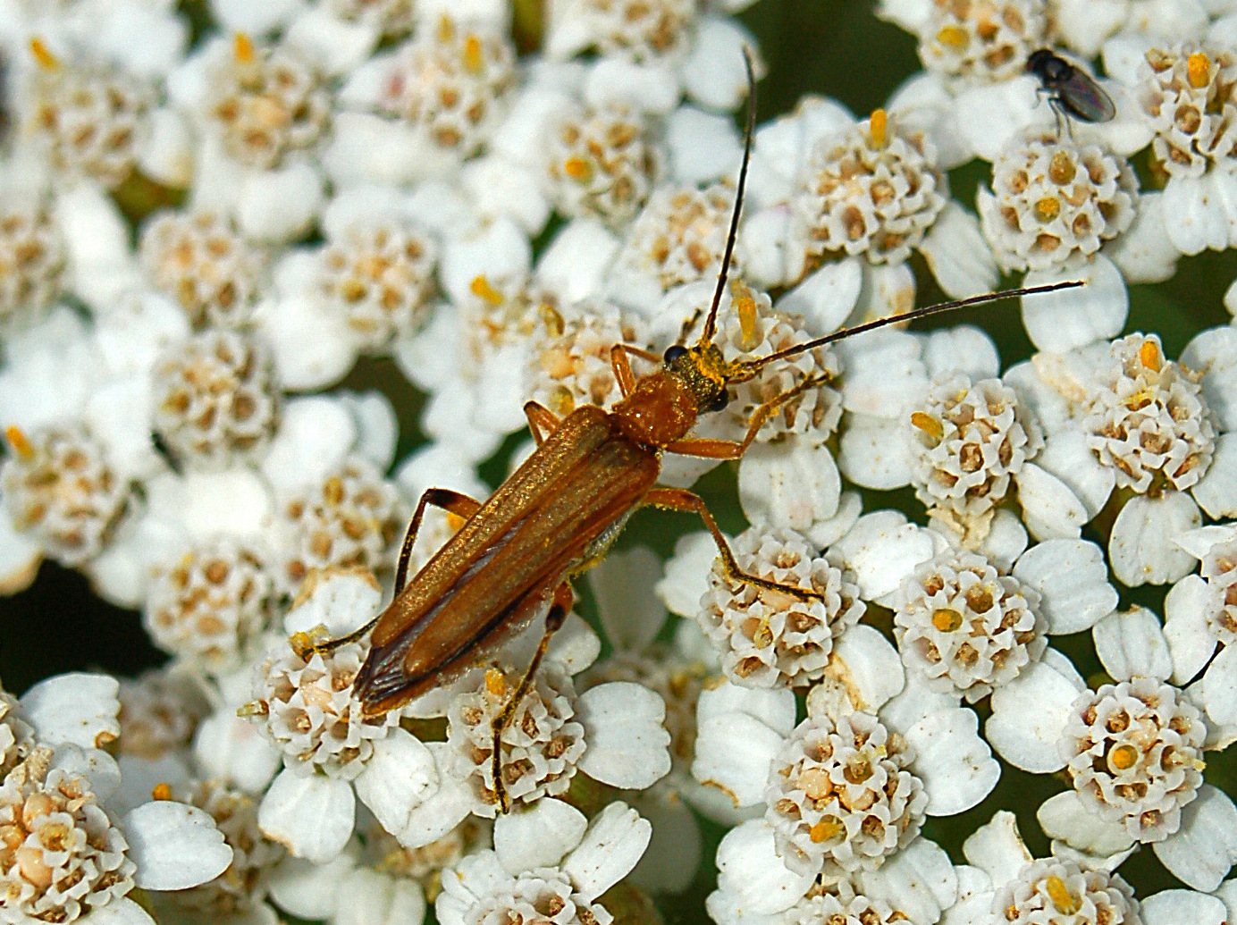 Oedemera podagrariae - female. Vi Superiore, Genova, Italy